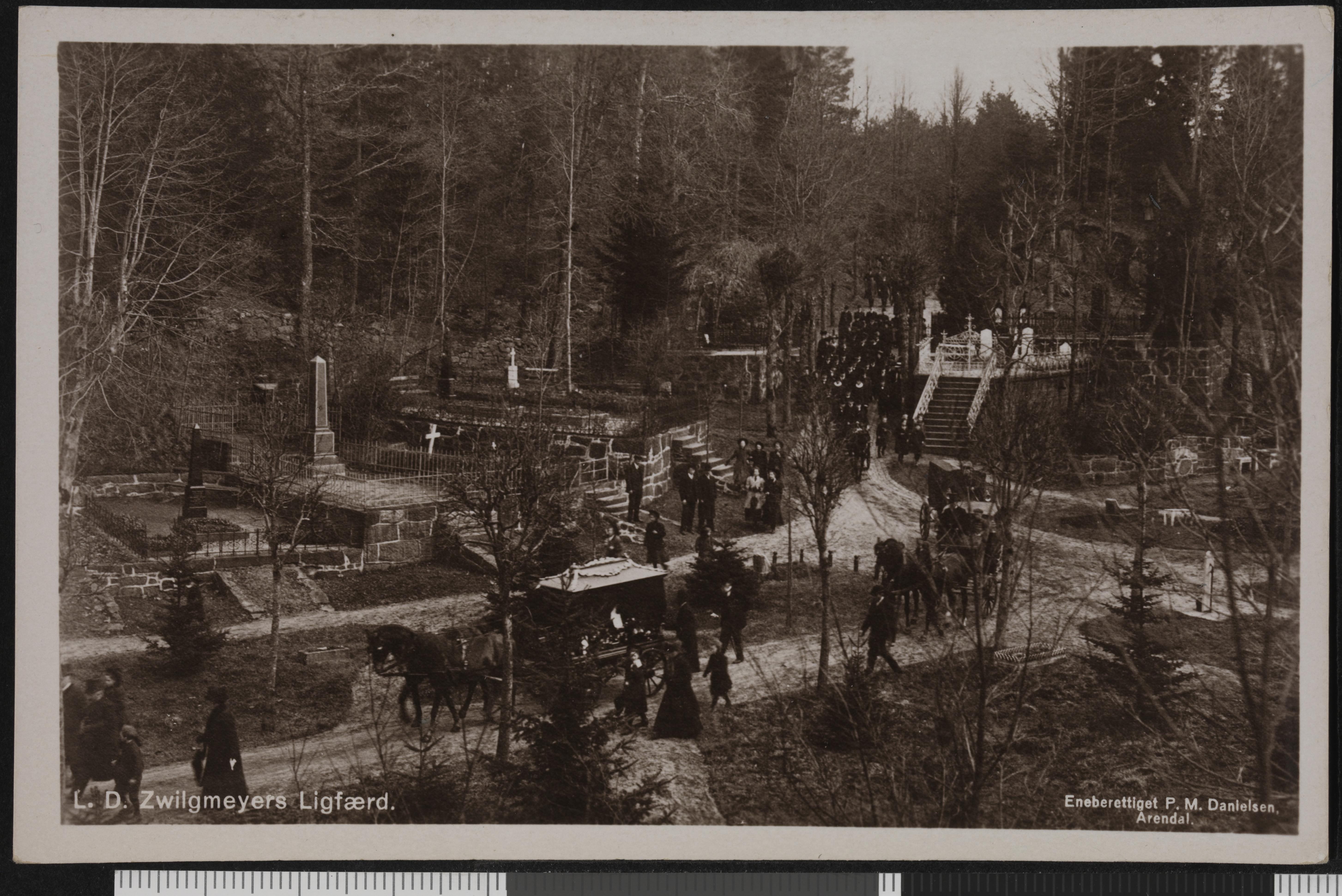 Bildet er hentet fra Nasjonalbibliotekets bildesamling Arendal kirkegård, Arendal, Aust-Agder Depicted person: Zwilgmeyer, Ludvig Daae